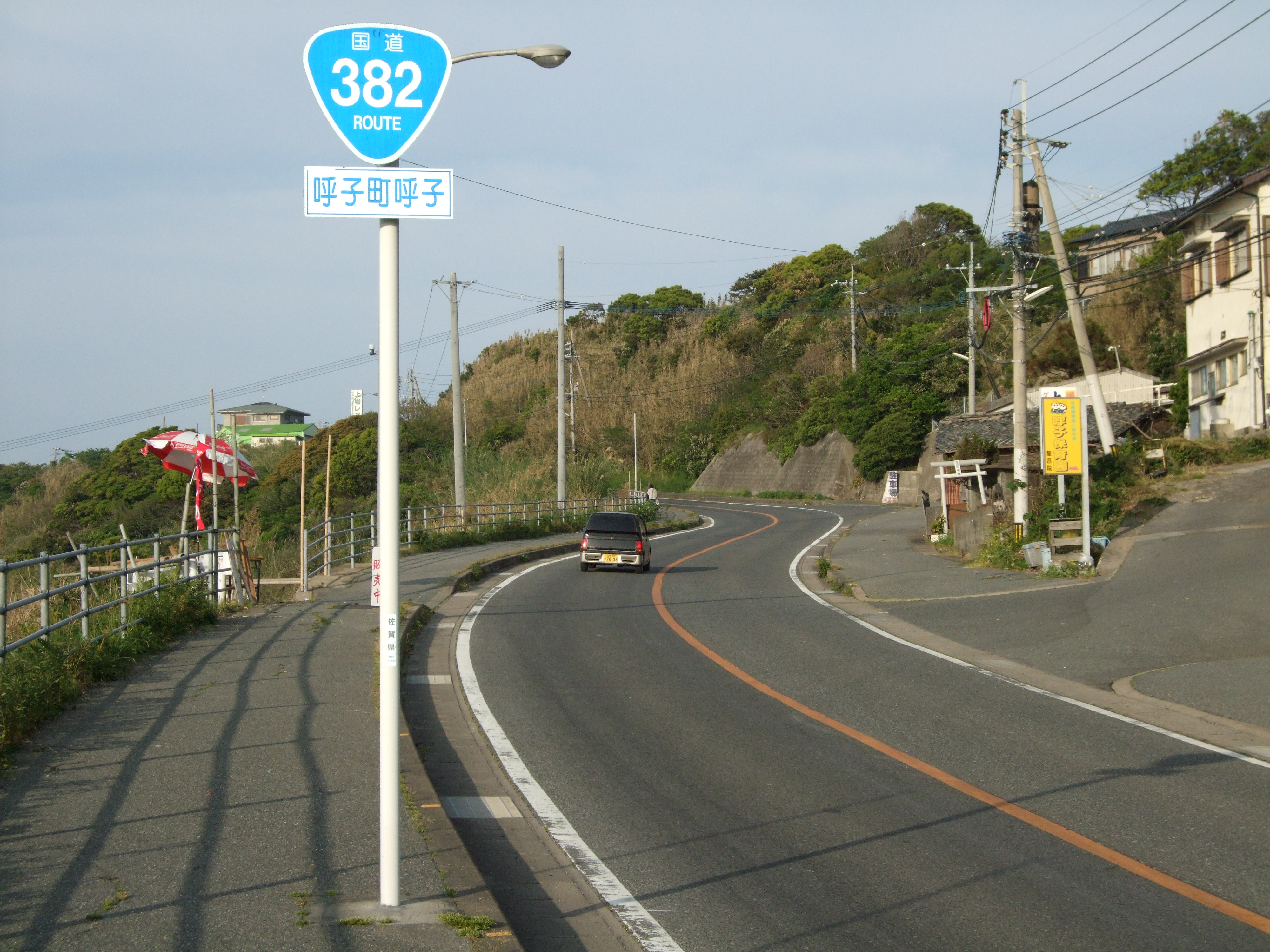 R382_yobuko in Saga, Japan